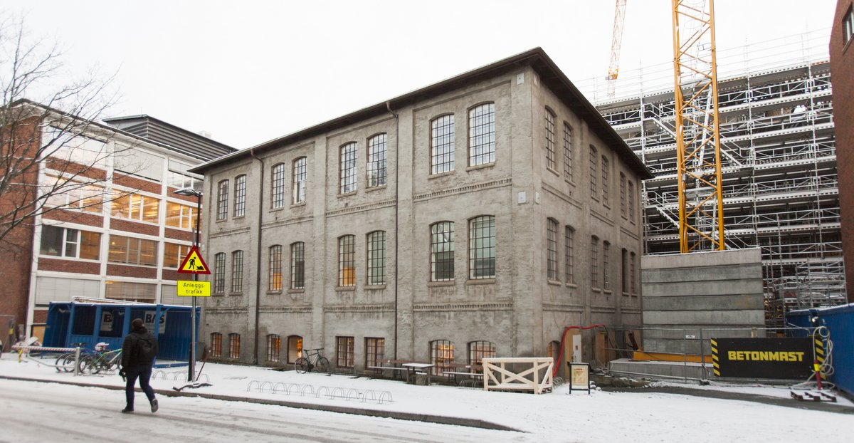 Bygningen der NTNU UB Kalvskinnet holder til